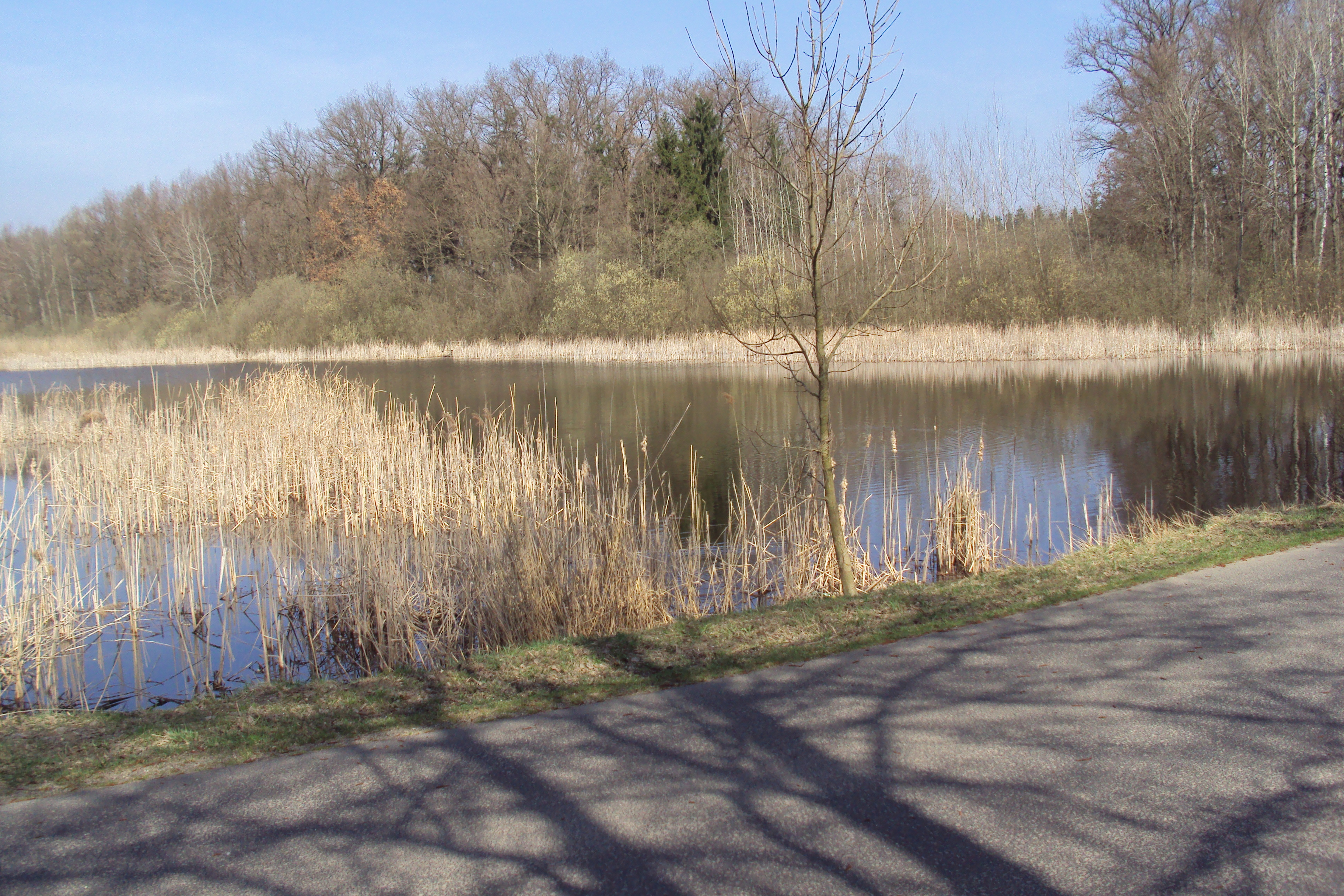 Rybník je u silnice Holany-Zahrádky, katastr Holany 640735 na Českolipsku